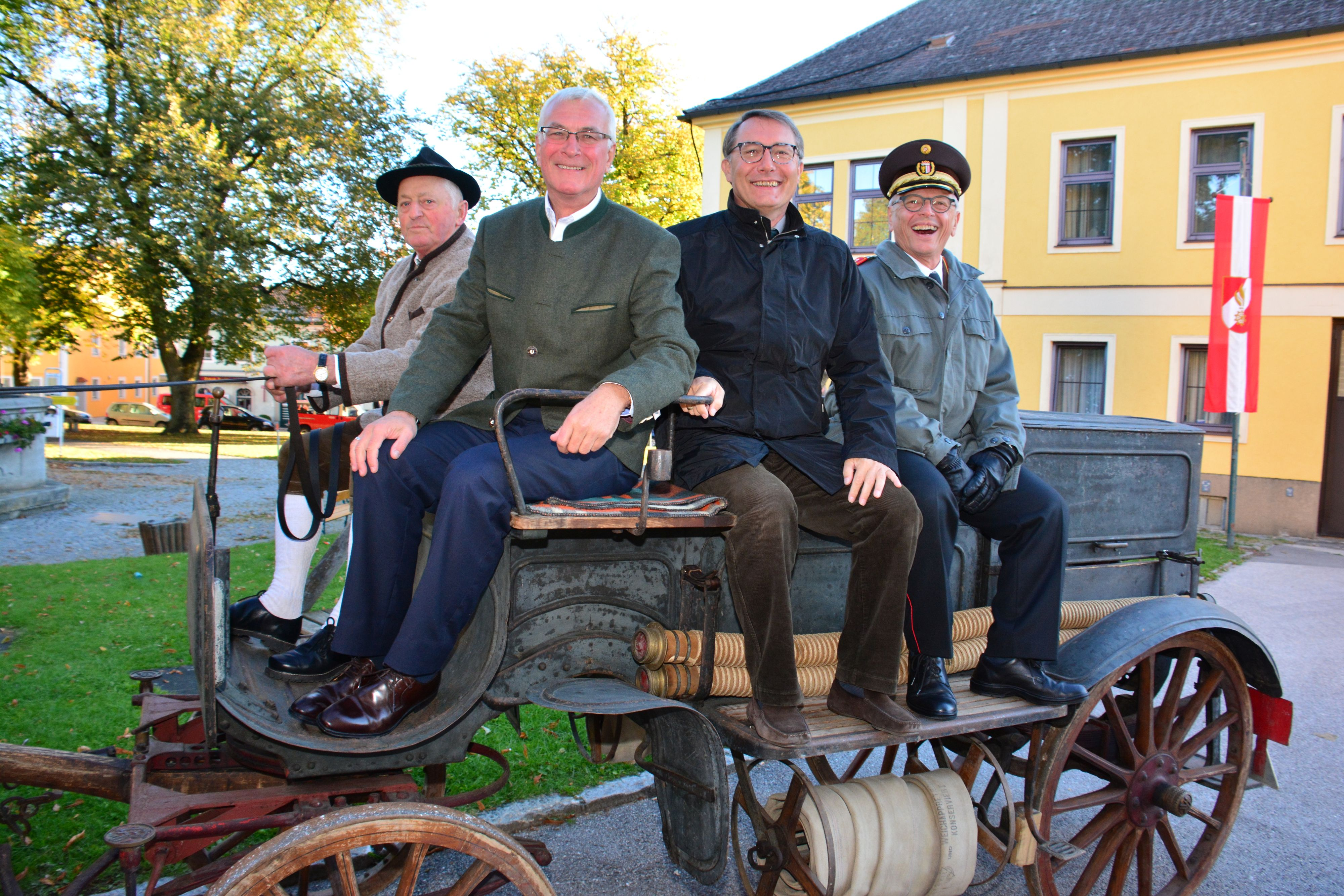 Segnung des neuen Feuerwehrhauses und eines neuen Kleinlöschfahrzeuges in Schenkenfelden im oberösterreichischen Mühlviertel